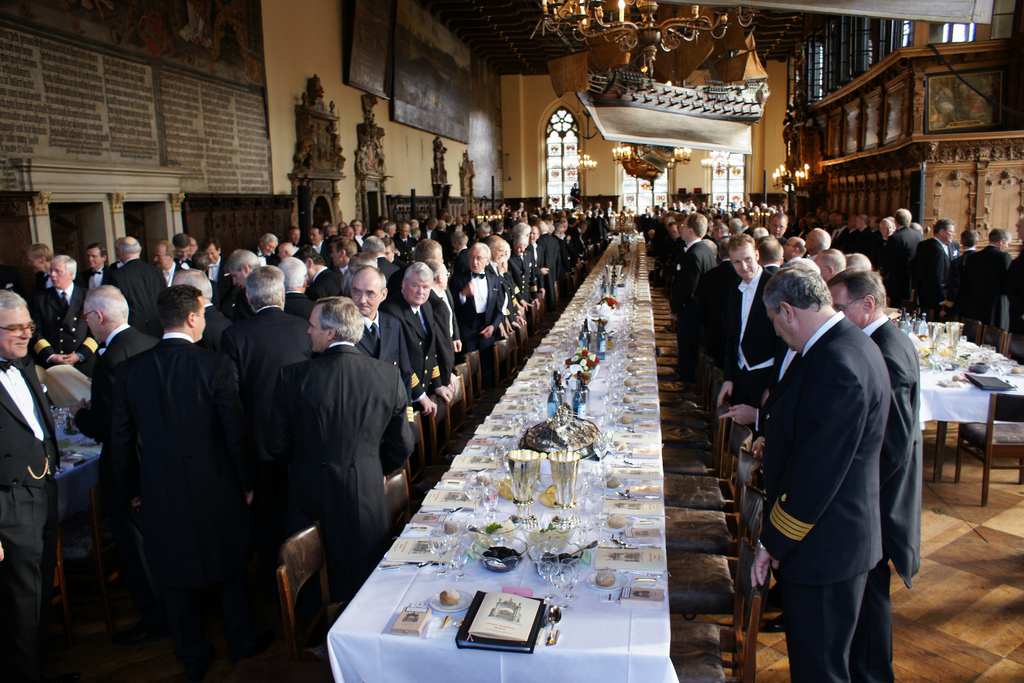 „Stimmungsbild“ von der 465. Schaffermahlzeit 2009 von Haus Seefahrt in der Oberen Rathaushalle des historischen Rathauses in Bremen, Deutschland: Kurz vor Beginn des Festessens.